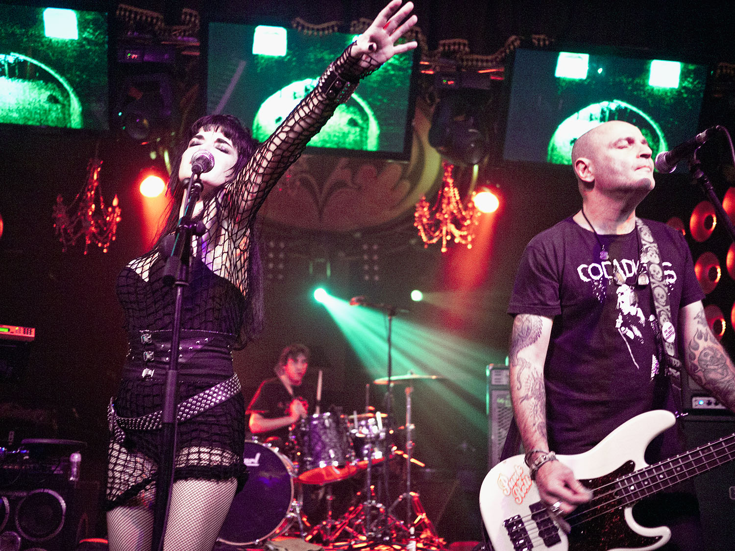 Concierto Ana Curra Parálisis Permanente El Acto